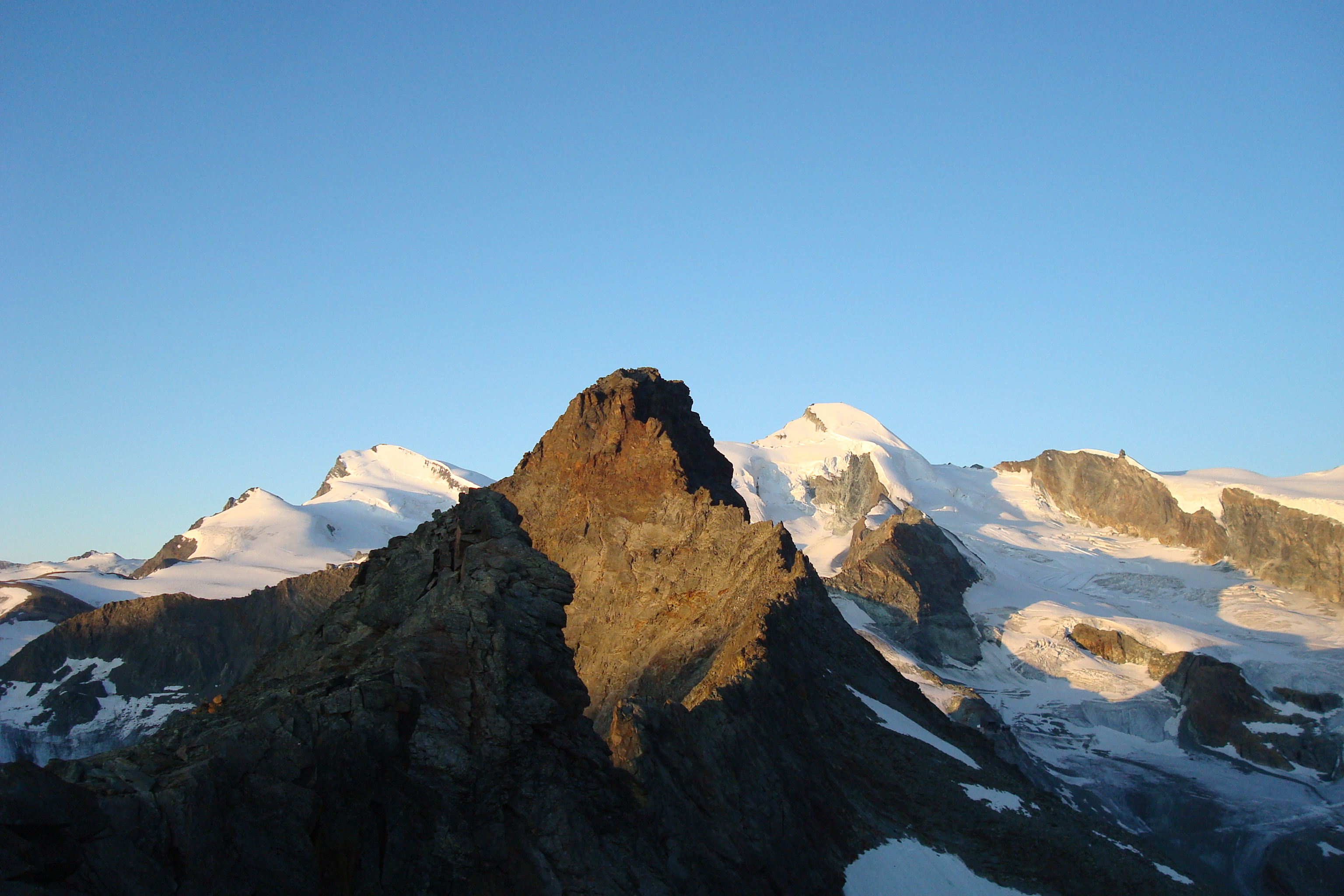 Egginer in der Morgensonne vom Mittagshorn gesehen. Links daneben das Fluchthorn und das Strahlhorn, rechts das Allalinhorn.